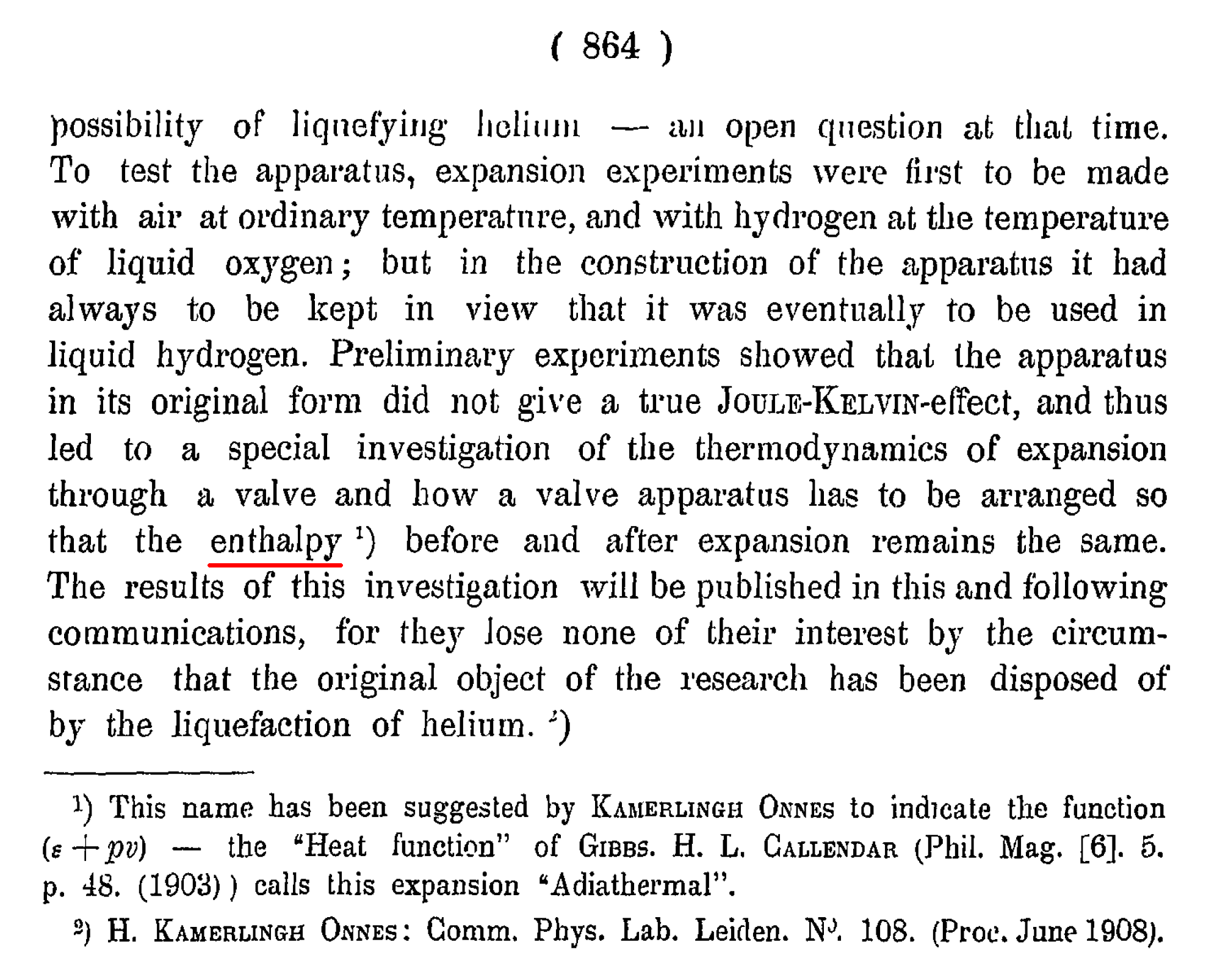 Первое письменное упоминание об использовании Х. Камерлинг-Оннесом термина «энтальпия» в его современном значении, датированное 1909 годом (Dalton J. P. Researches on the Joule-Kelvin effect, especially at low temperatures. I. Calculations for hydrogen // KNAW Proceedings, 1909, vol. 11, pp. 863—873)